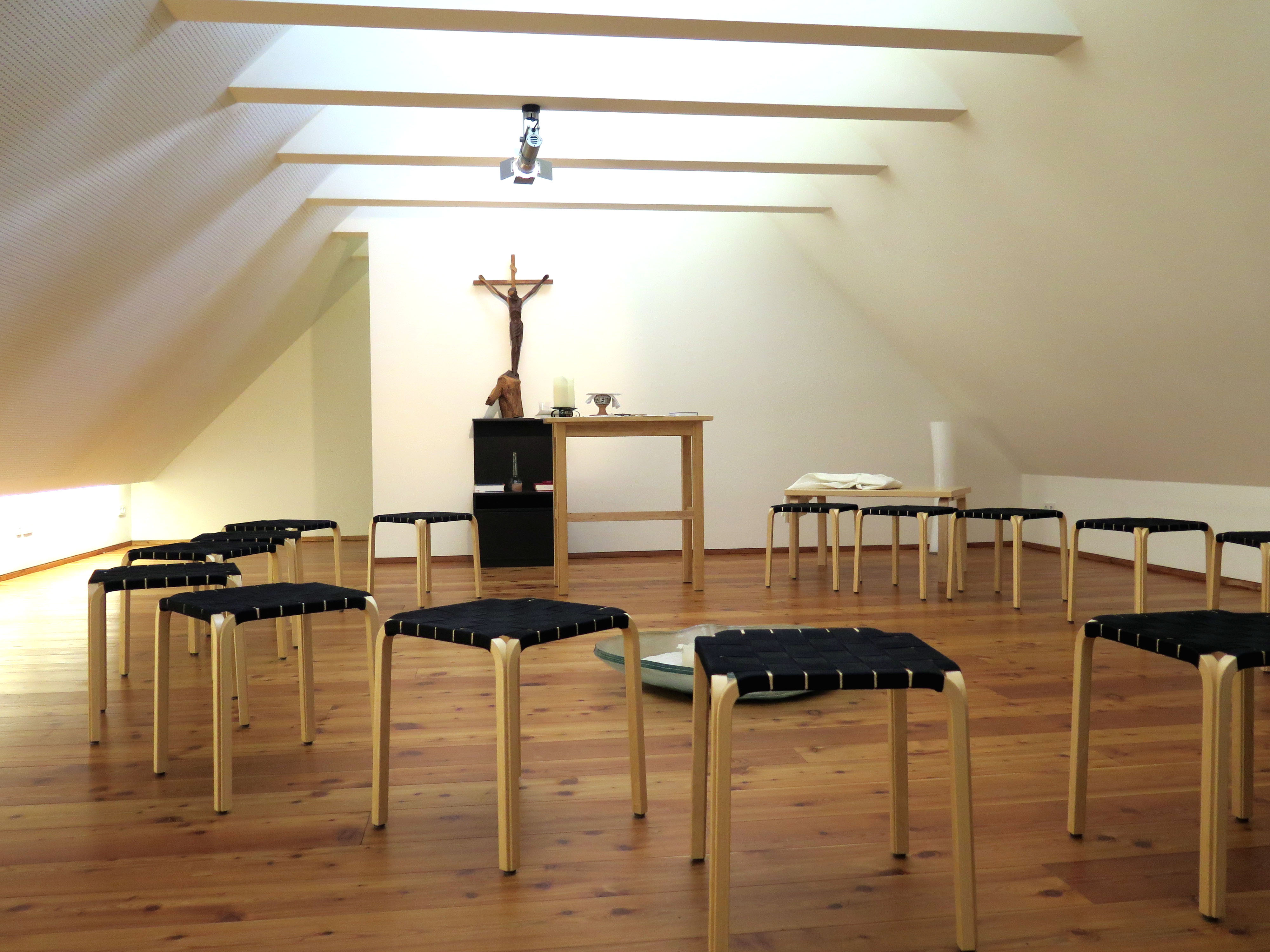 Gebetsraum mit Altar in der Mitte, Stühlen im Halbrund, Licht von oben in der Decke